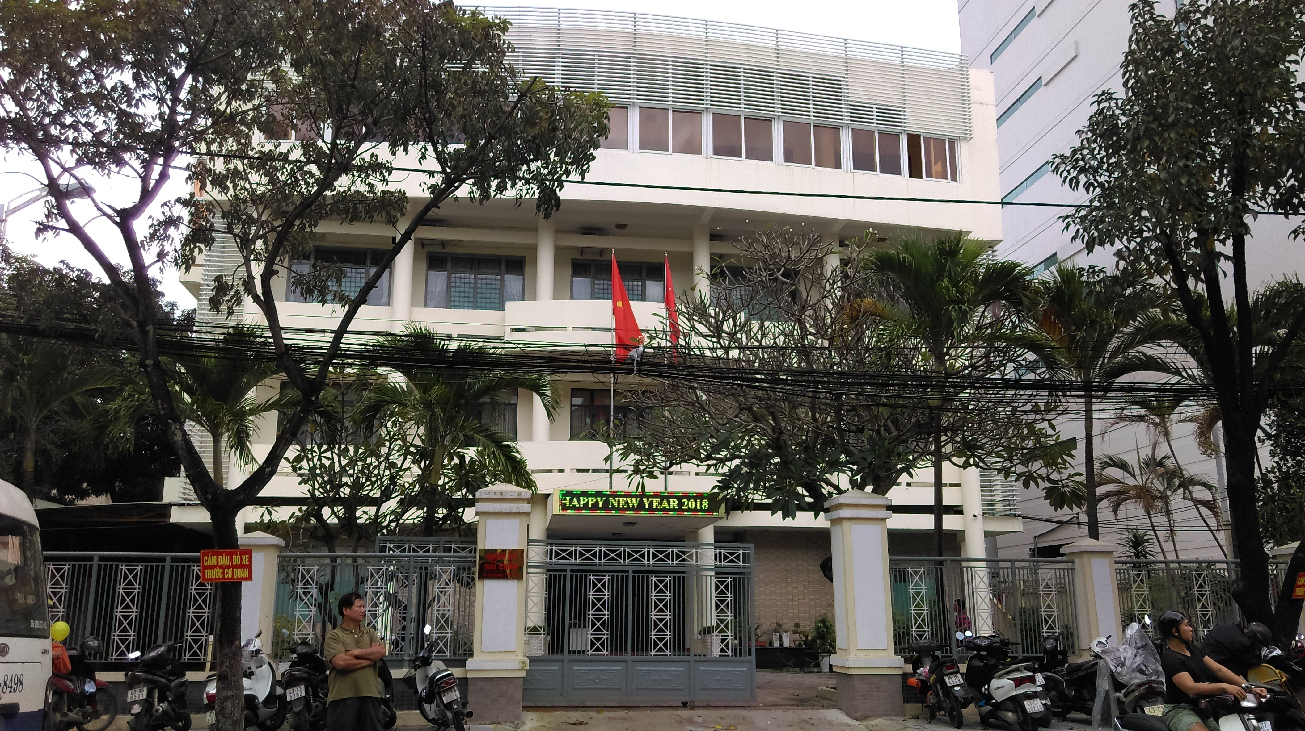 Giấy phép